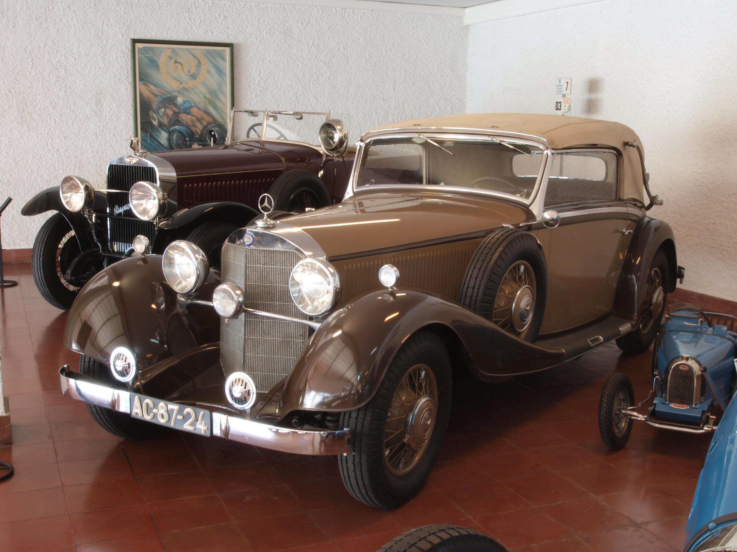 Photographed at the Caramulo museum, 'Museu do Caramulo', Caramulo, Portugal. OLYMPUS DIGITAL CAMERA